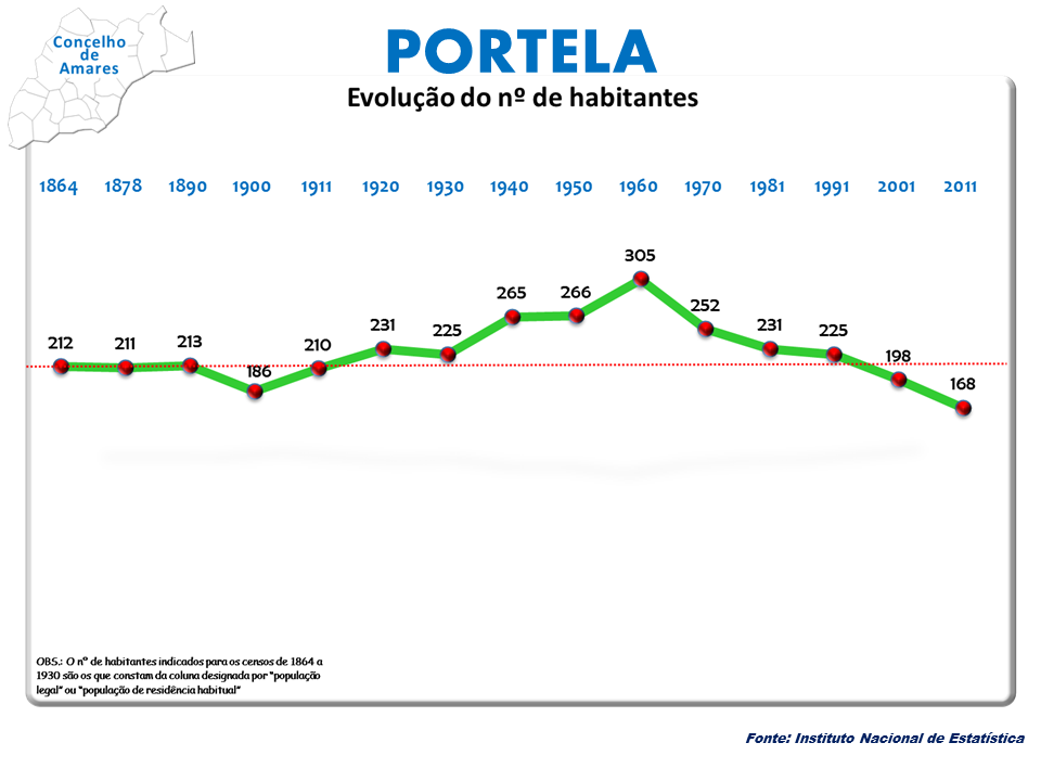 Censo 2011